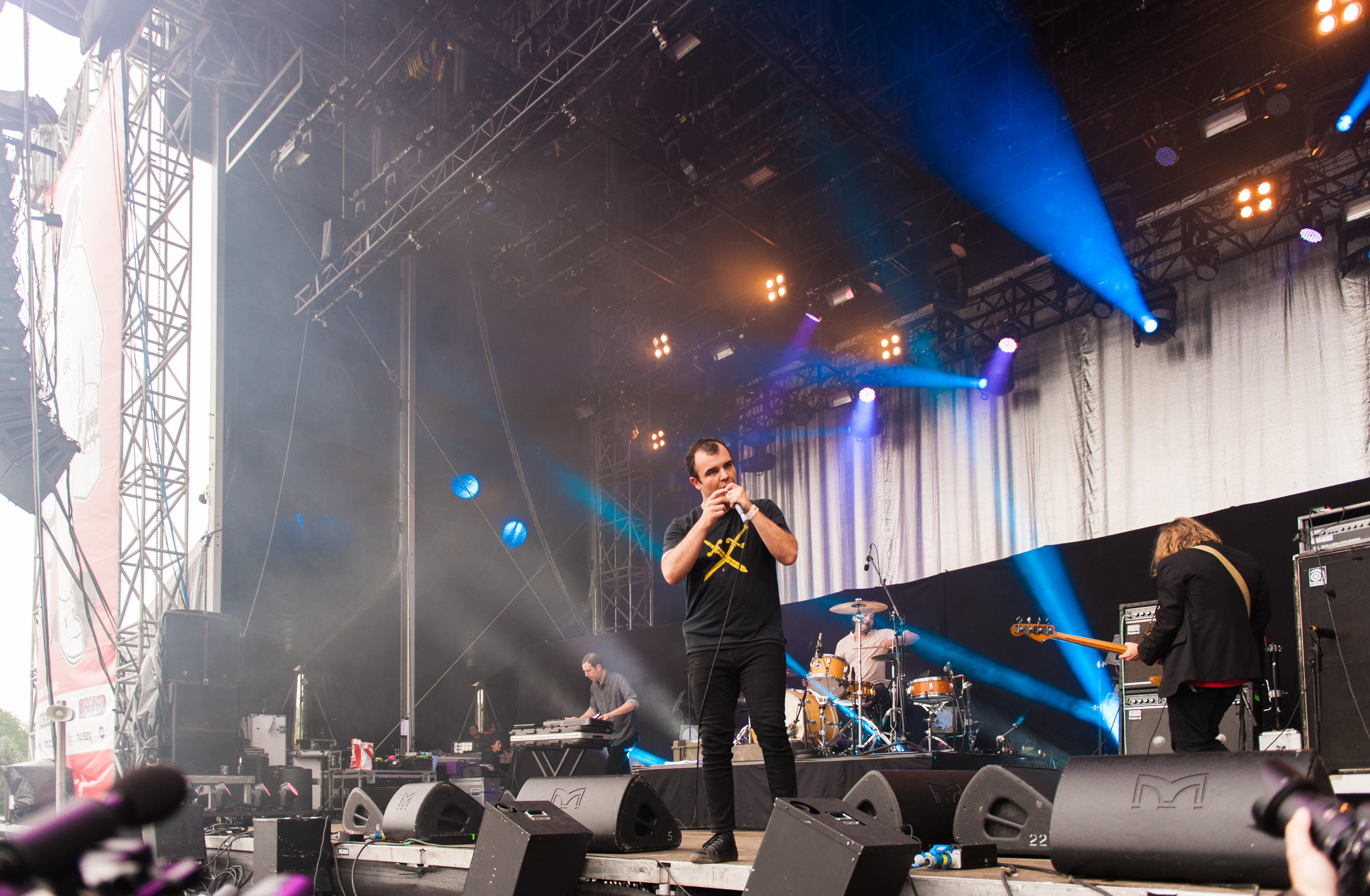 Die Band Future Islands auf dem Kosmonaut Festival 2015 in Chemnitz Oberrabenstein.